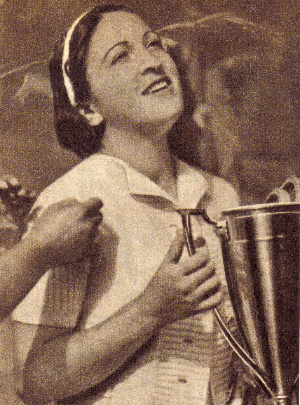 Anita Lizana de Ellis (19 de noviembre de 1915 - † 21 de agosto de 1994), apodada "Ratita", fue una tenista chilena. Ganó la final del torneo de Forest Hills a la tenista polaca Jadwiga Jedrzejowska por 6-4 6-2, sin perder ningún set en todo el torneo. En 1938 se casó con Ronald Ellis, un prestigioso tenista escocés.